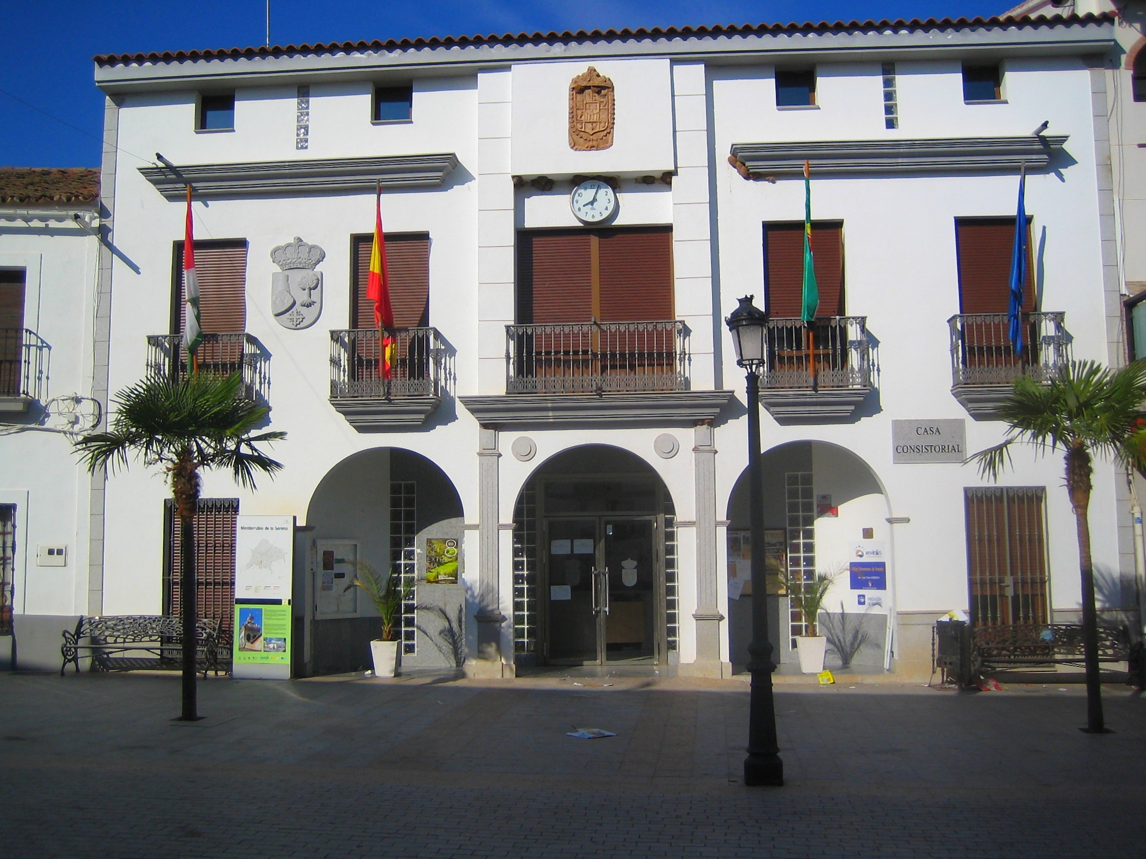 Casa consistorial de Monterrubio de la Serena (Badajoz) situada en la Plaza de España.